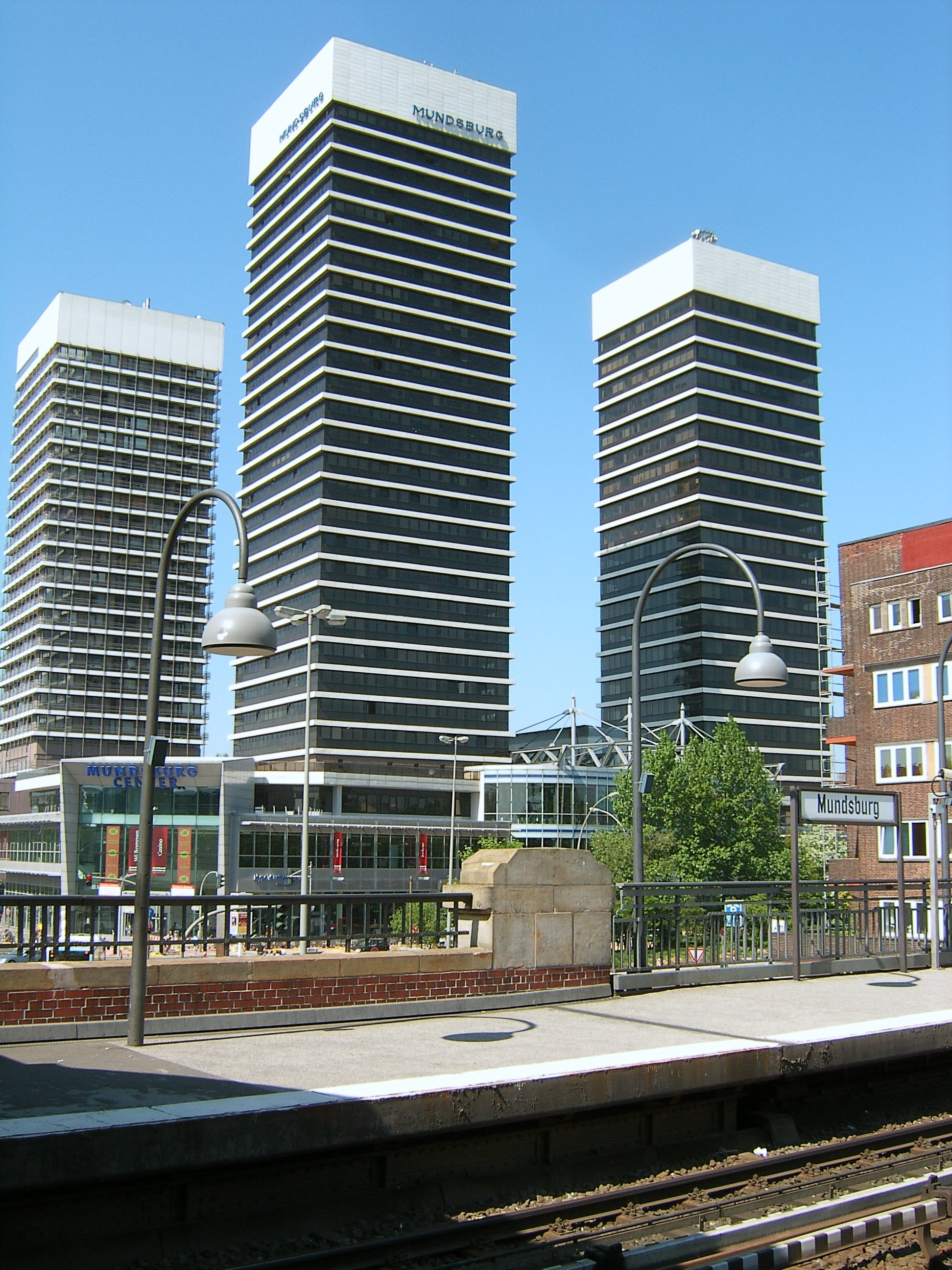 Die Mundsburg-Türme in Hamburg, ab 1963 nach Entwürfen Garten, Kahl & Bargholz erbaut, in Barmbek-Süd von der U-Bahnhaltestelle Mundsburg, deren stadteinwärtiger Bahnsteig im Vordergrund zu sehen ist, aus gesehen.